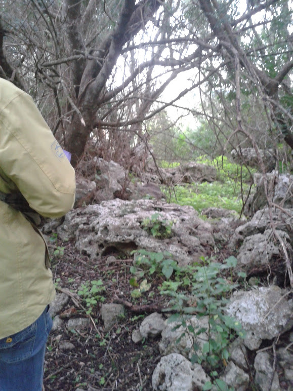 Talaïot 2